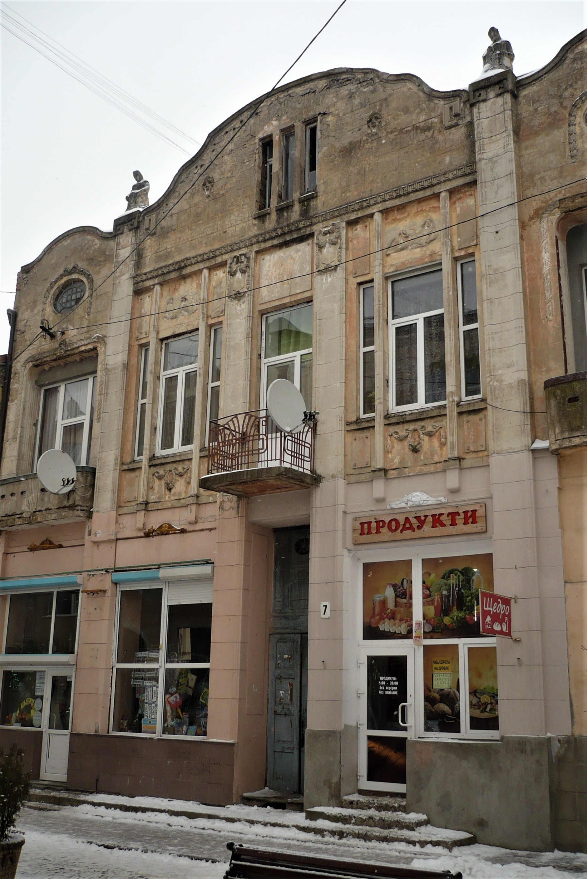 Kamienica